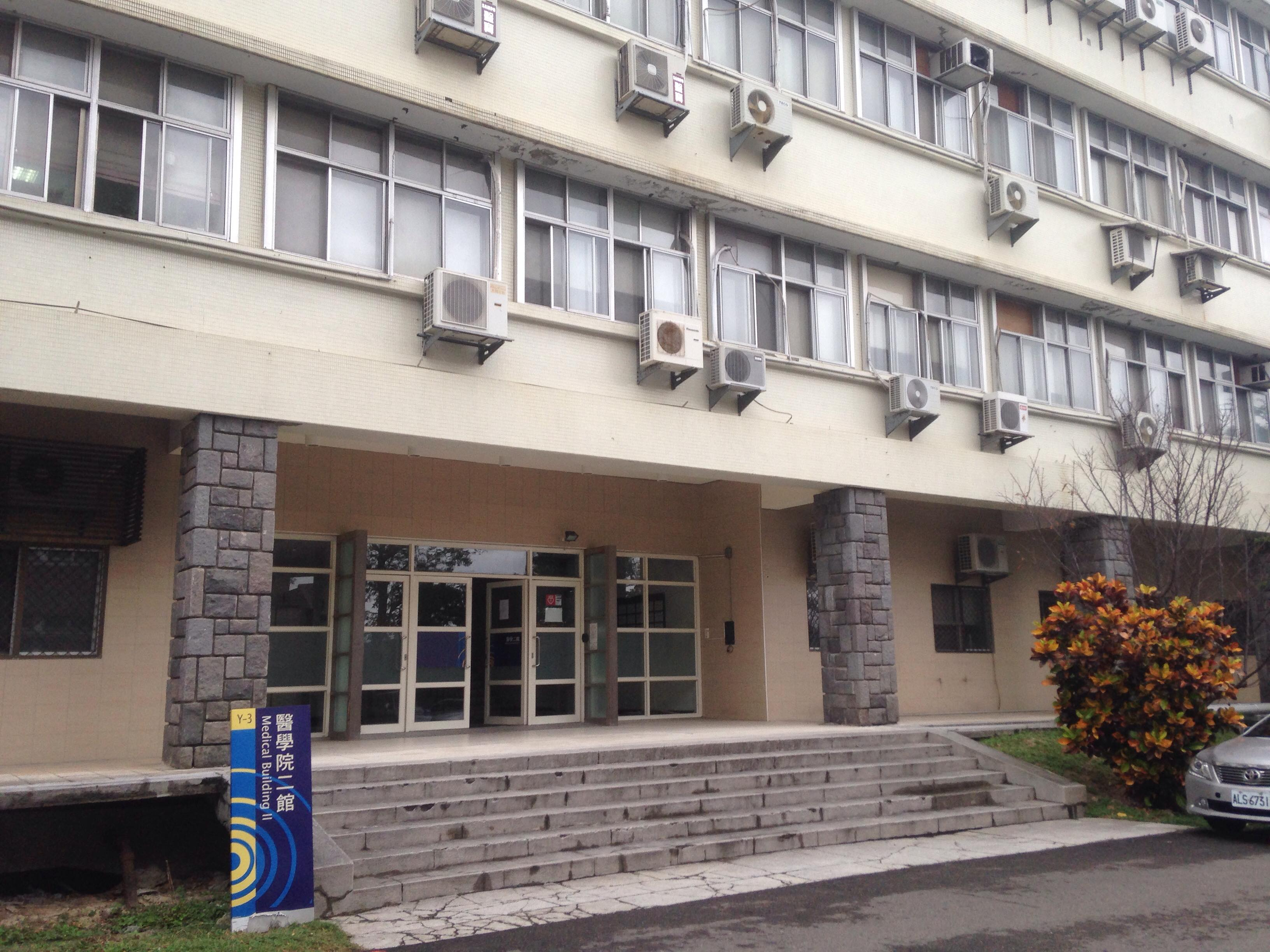 國立陽明大學醫學院二館